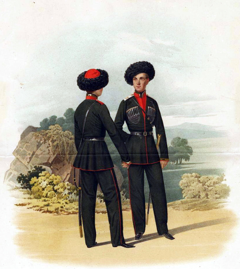 Воспитанники из горцев 1-го и 2-го Кадетских корпусов (в парадной форме) 31 марта 1855